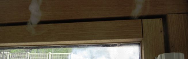 Fuite d'air localisée par machine à fumée dans le cadre d'un test d'infiltrométrie réalisé par Aero Tests